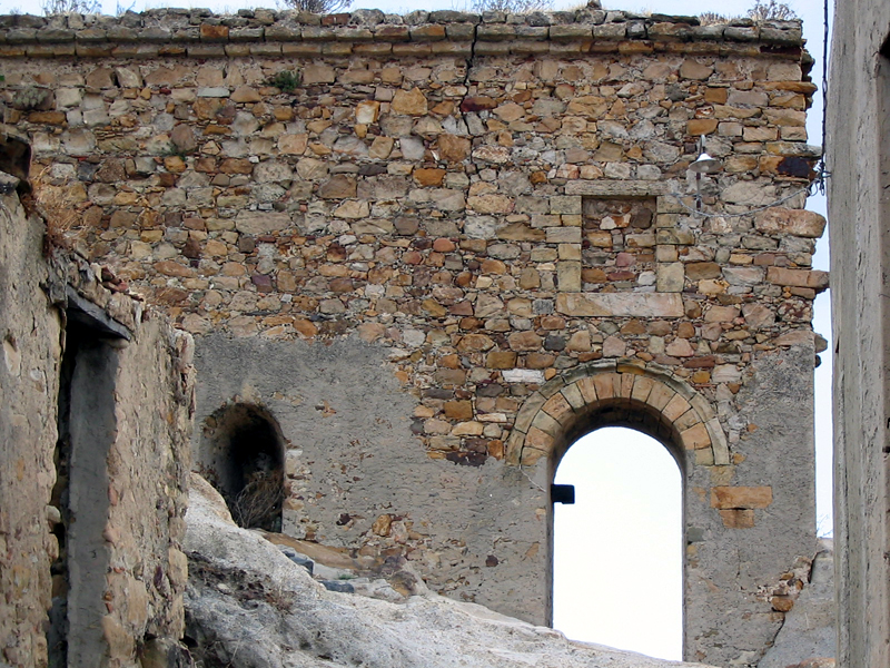 La porta "falsa" è il punto di ingresso per la rocca.